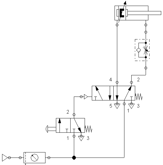 Einfache pneumatische Schaltung